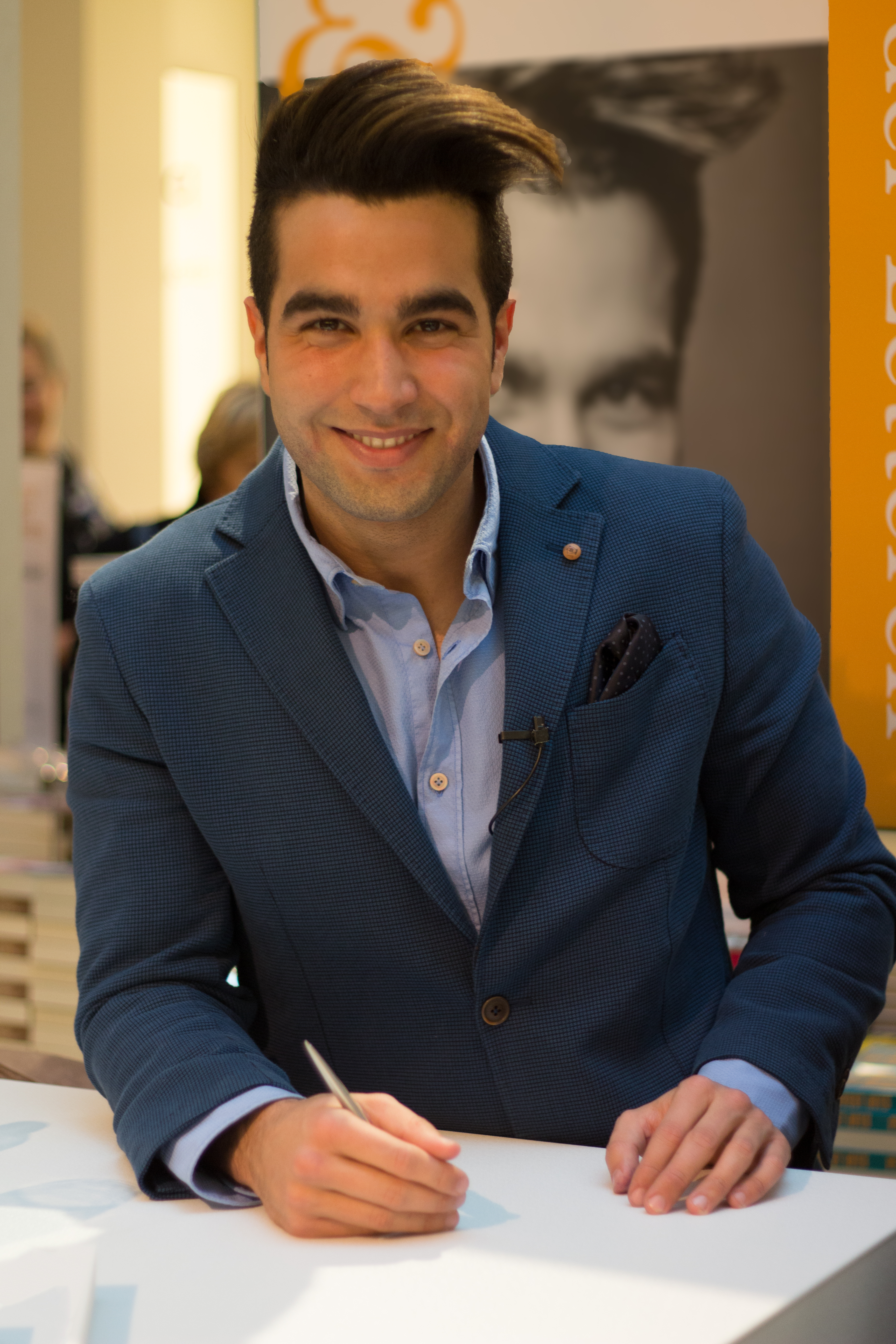 Mano Bouzamour